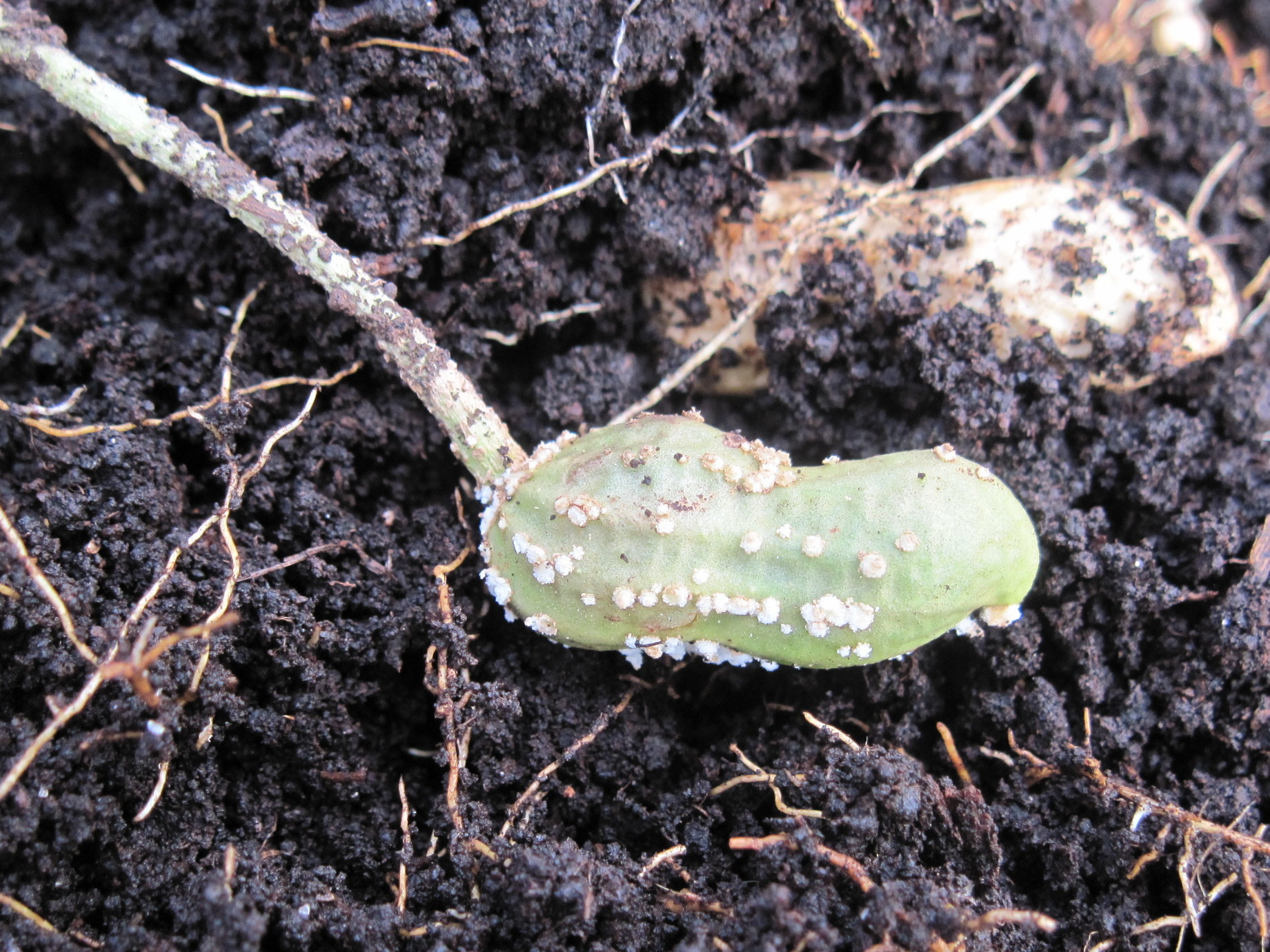 Kacang tanah diserang kulat.